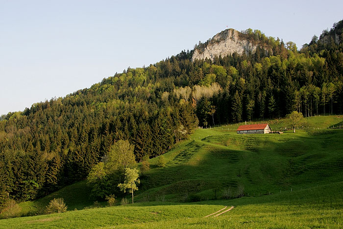 Bölchenfluh im Kanton Basel-Landschaft